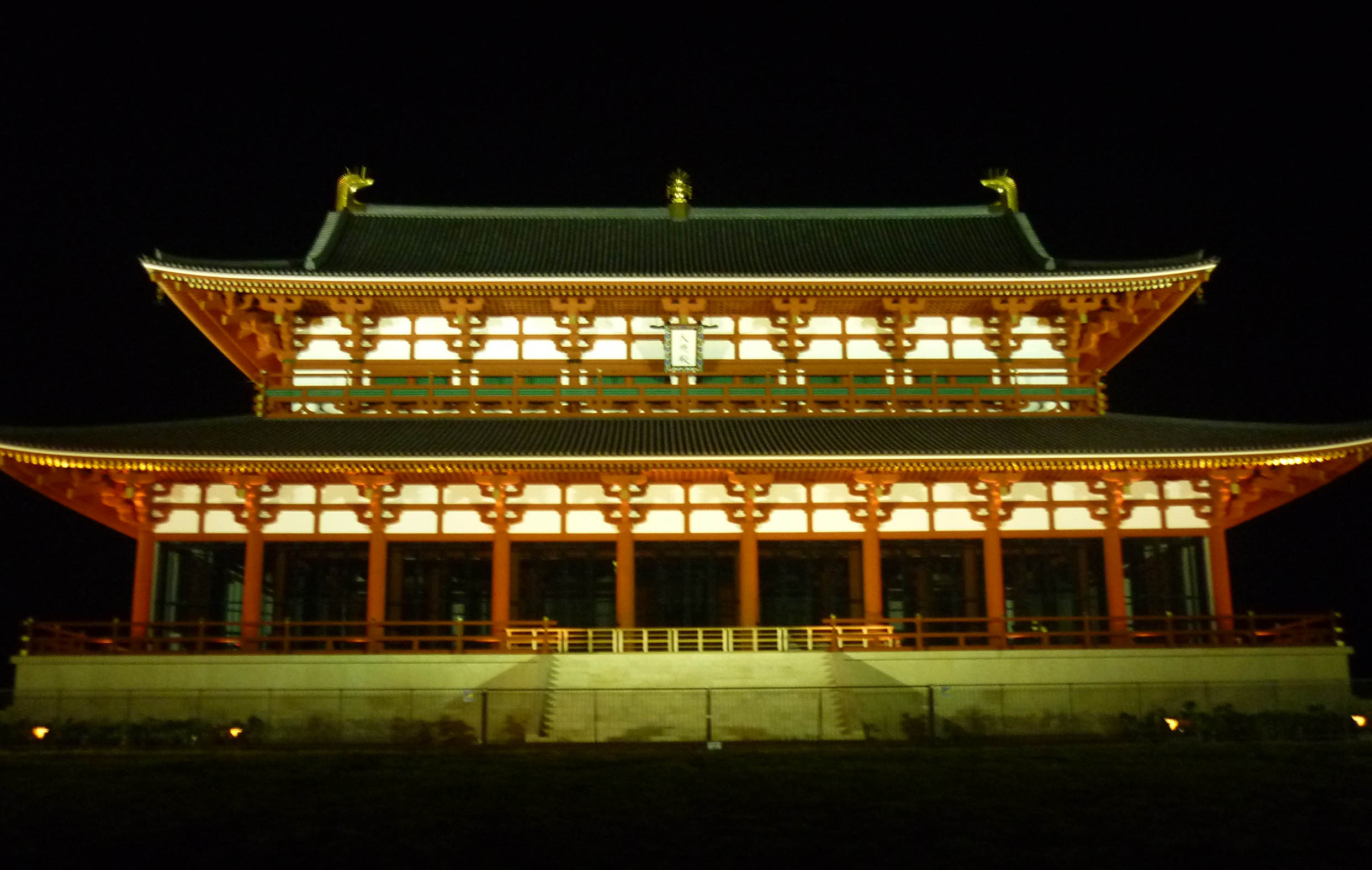 ライトアップした平城宮大極殿